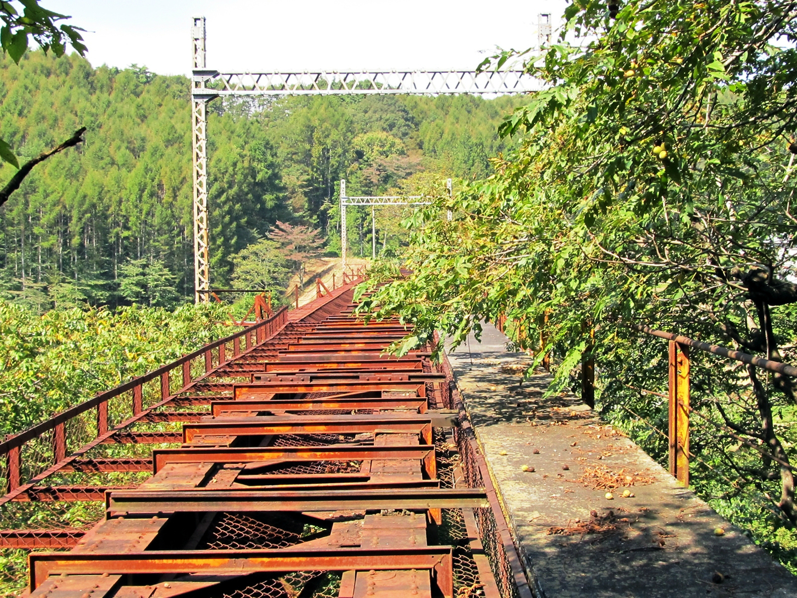 立場川橋梁を信濃境側から